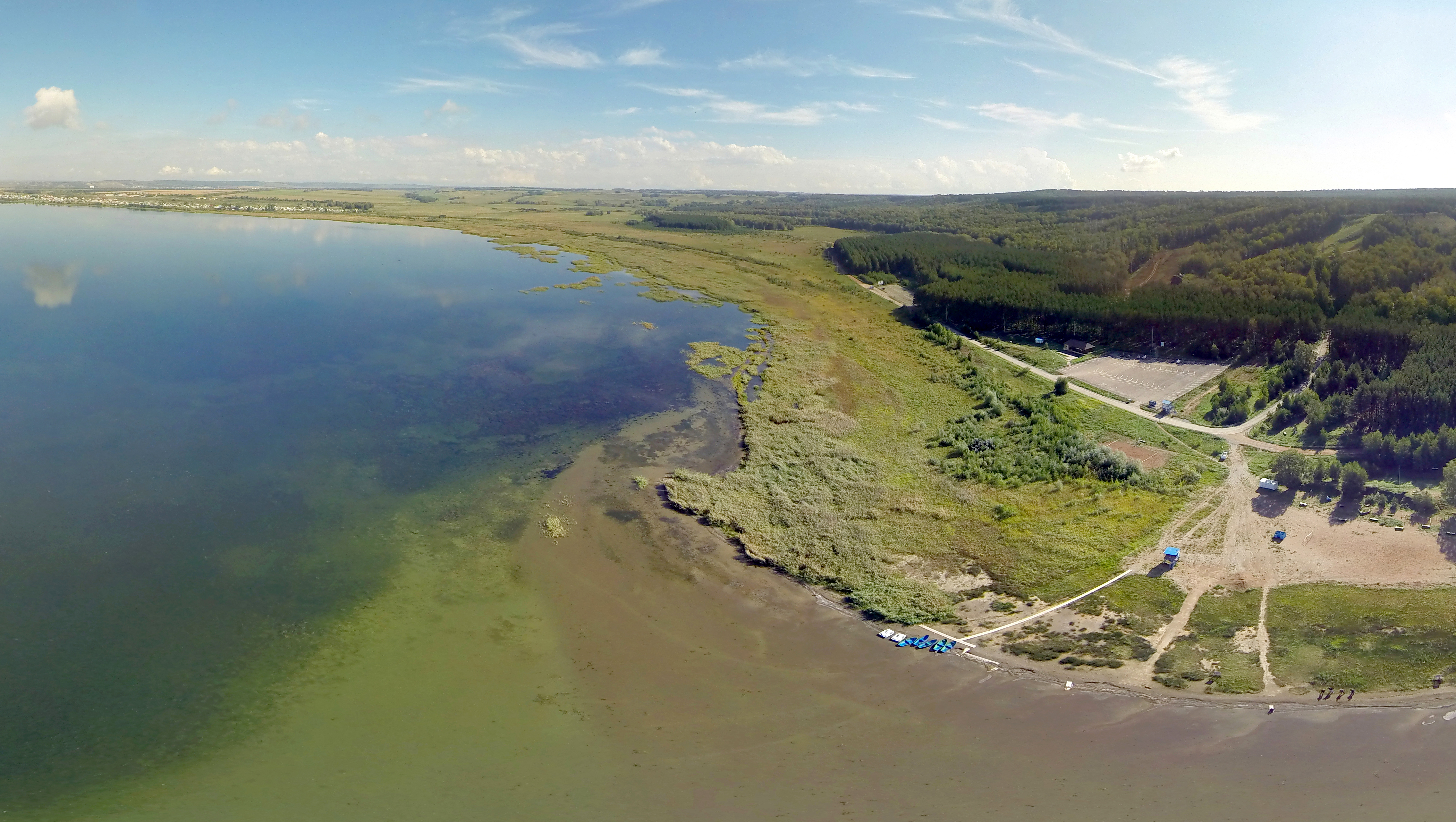 Кандры-Куль, Туймазинский район This image is related to the protected area of Russia number 0210213